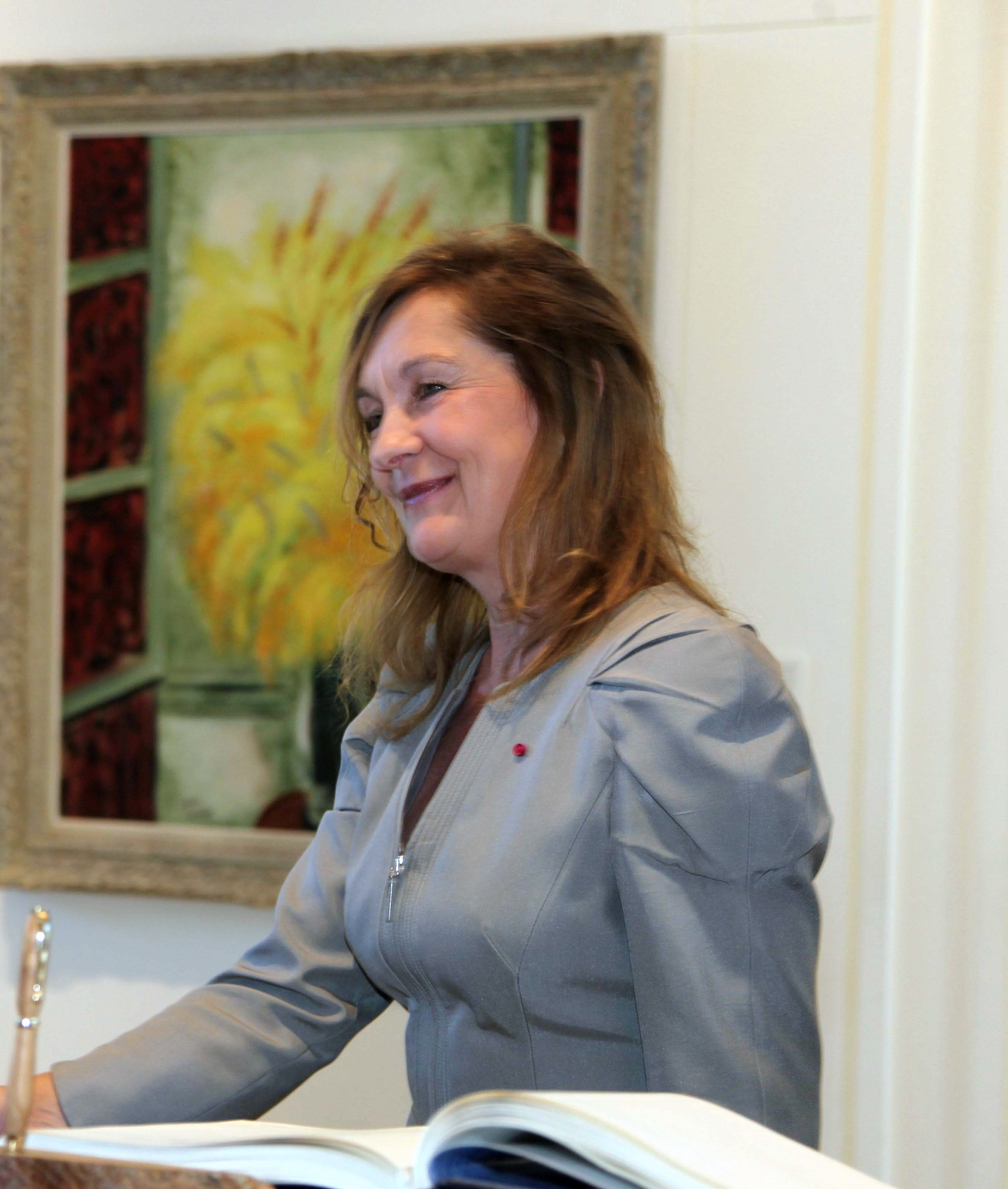 Eesti uus suursaadik Iisraeli Riigis Malle Talvet-Mustonen andis president Shimon Peresile üle oma volikirja